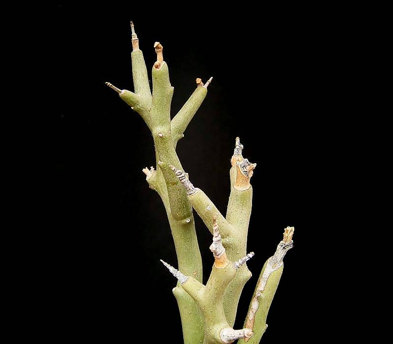 Euphorbia lignosa